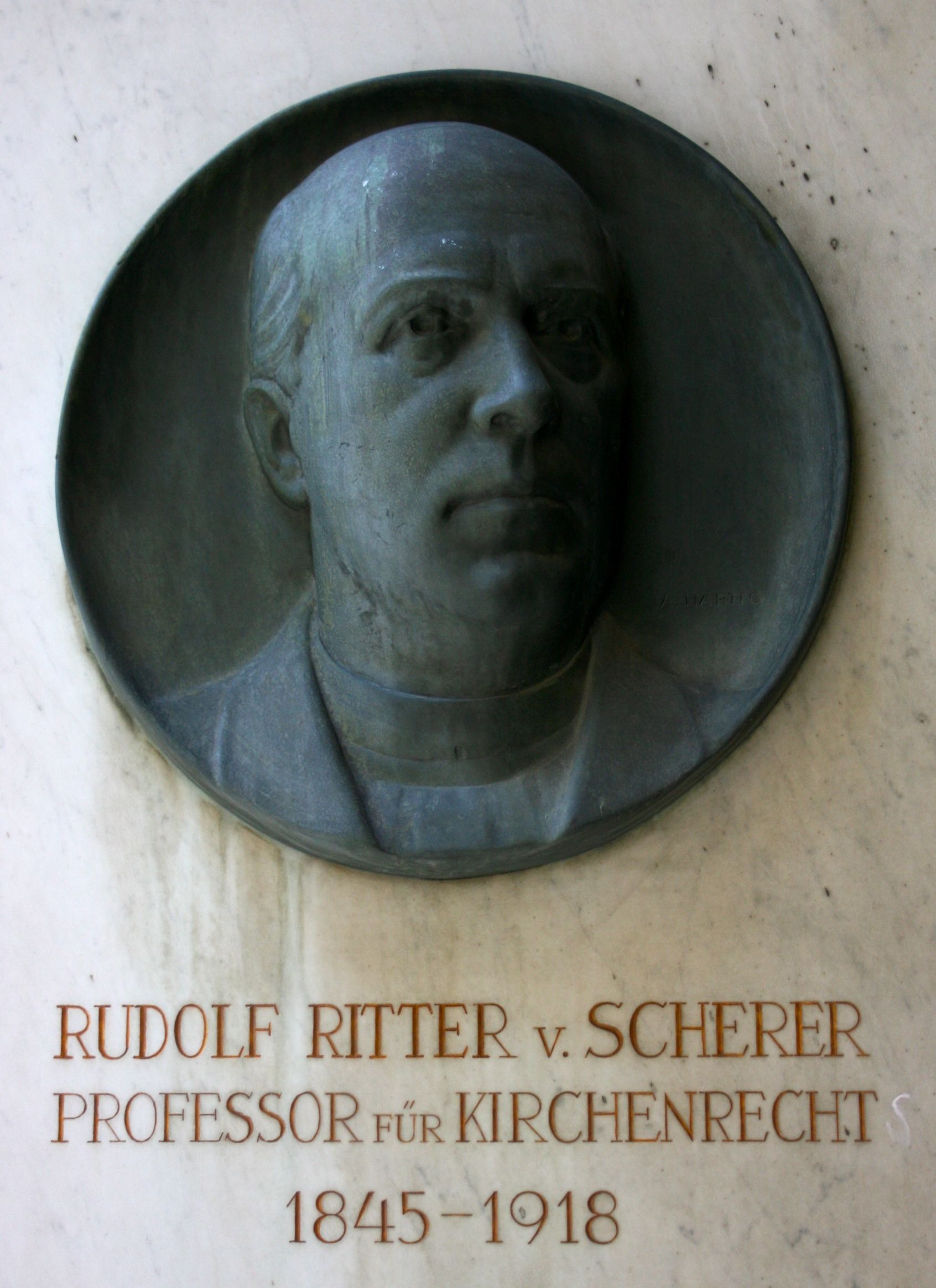 Wien, Universität, Ehrenhalle in den Hofarkaden: Relief Rudolf Scherer, Theologe, Prof. für Kirchenrecht (Bildhauer: Arnold Hartig).